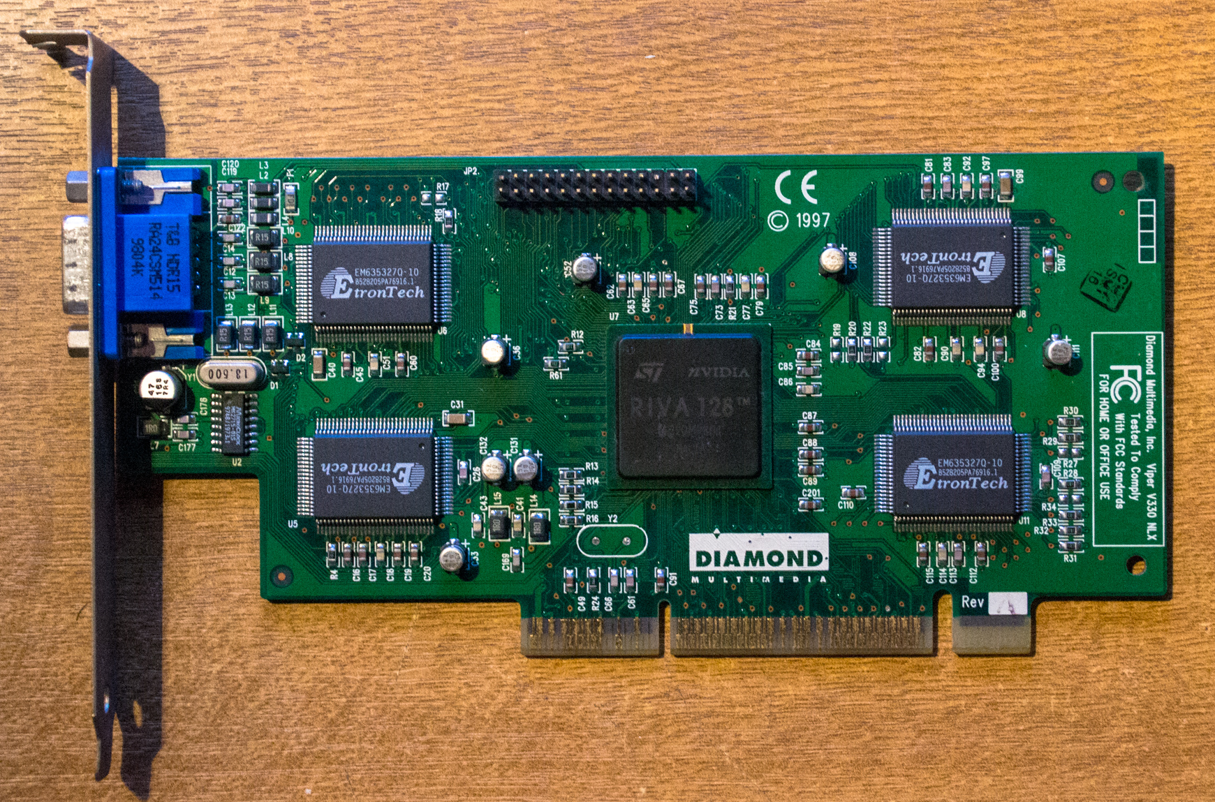 Tarjeta de Video AGP Diamond Viper V330 con procesador grafico nVidia Riva 128 y 4Mb de Memoria